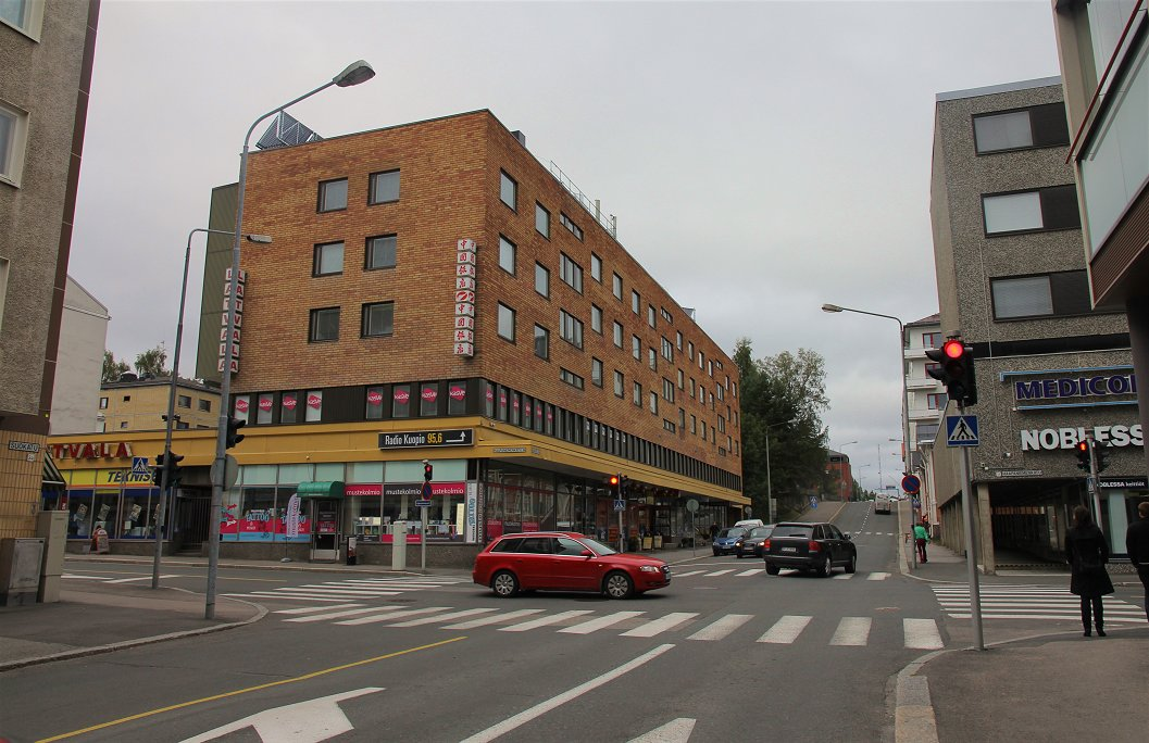 Suokatua Haapaniemenkadun risteyksessä. Kuvassa Suokadun vasemmanpuoleiset rakennukset kuuluvat toria ympäröivään Multimäen kaupunginosaaan (ydinkeskusta), oikean reunustan rakennukset ovat Maljalahtea.